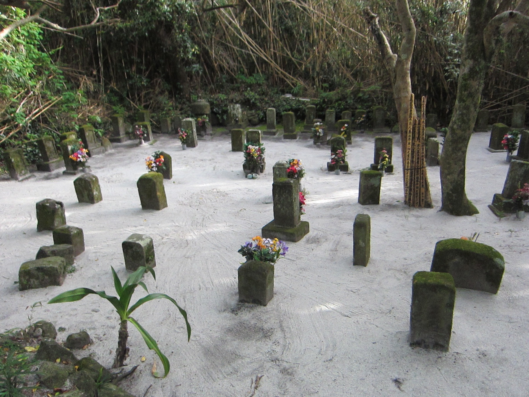 伊豆七島新島、流人墓地の画像。2011年5月2日撮影